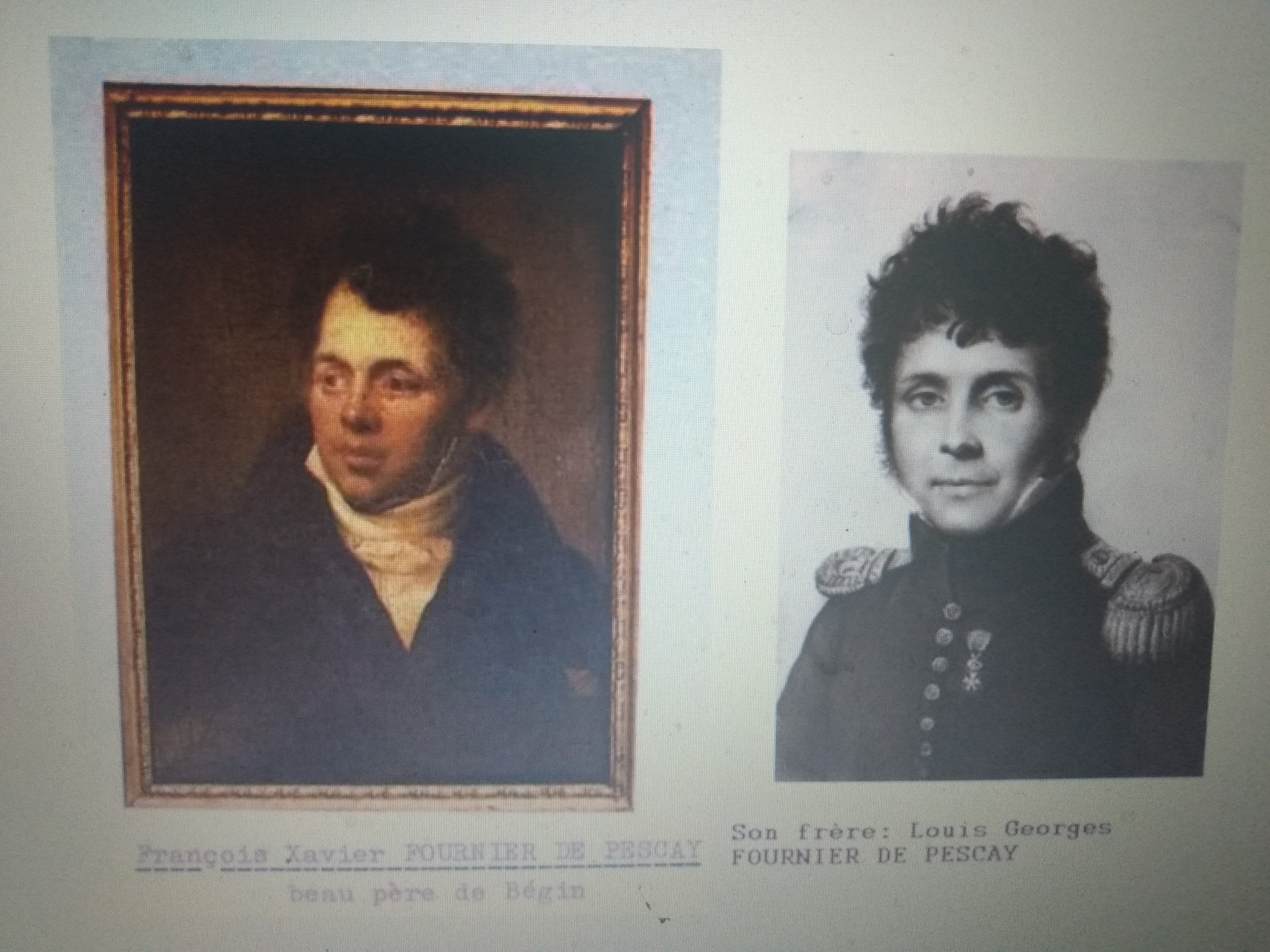 Francois Xavier et Louis Georges jeunes